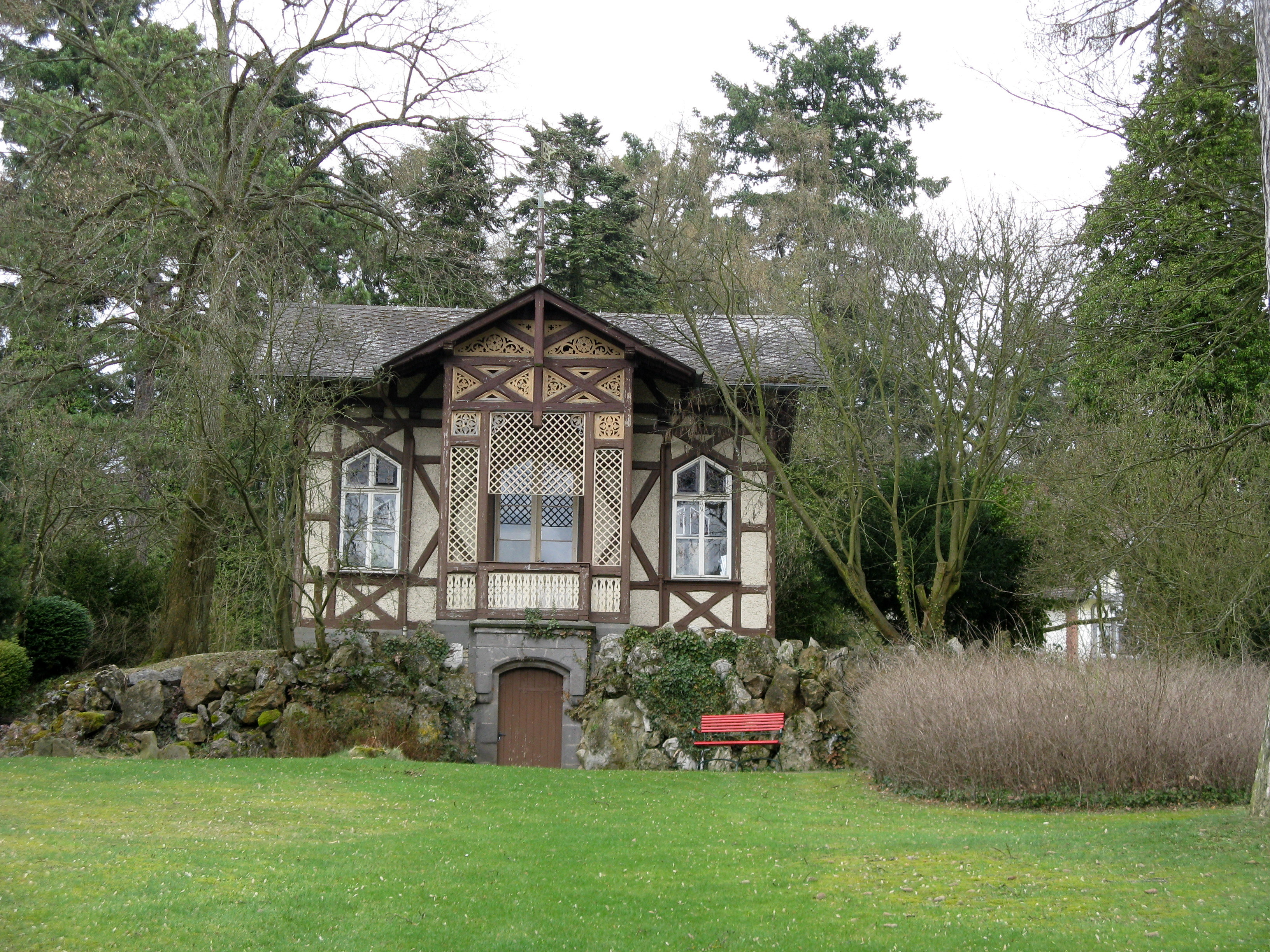 Schweizer Haus im Gailschen Park Rodheim-Biebertal